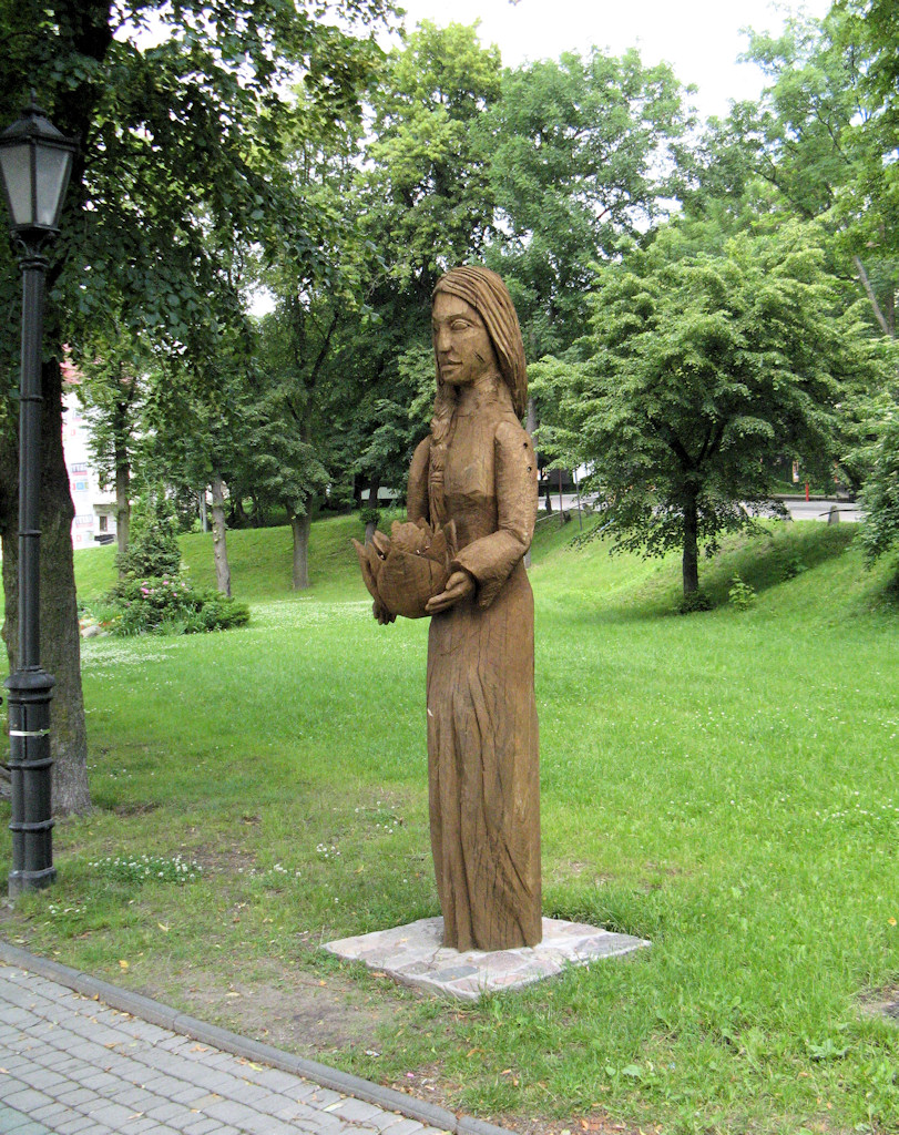 Rzeźba przy promenadzie nad Jeziorem Ełckim